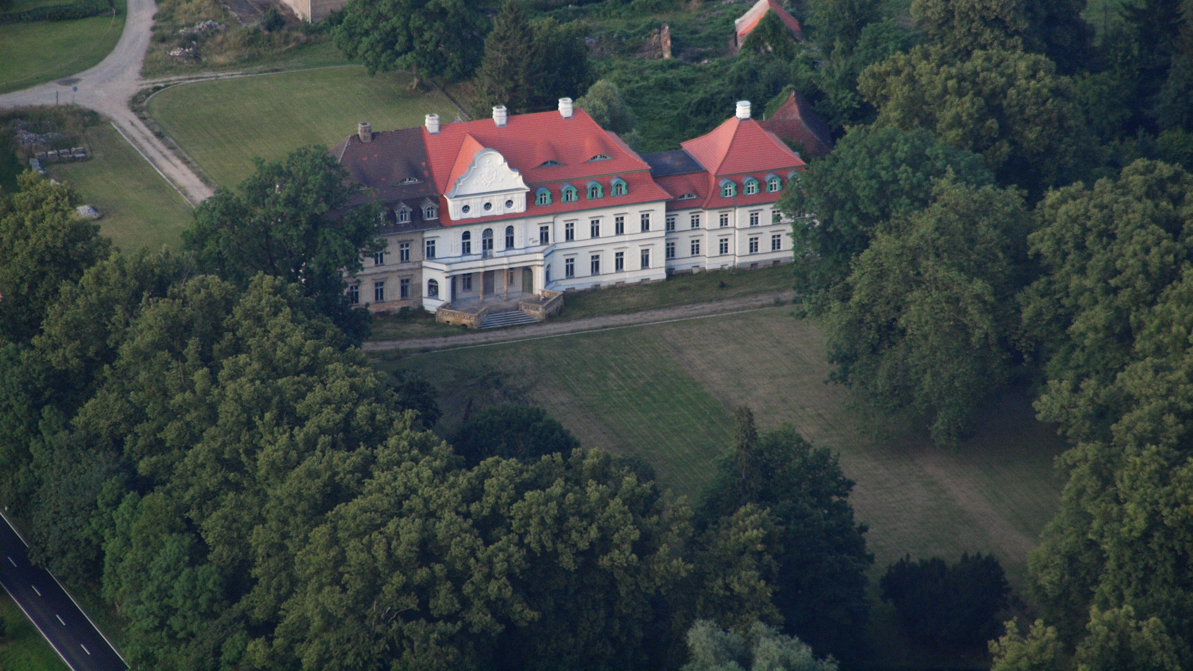 Vollrathsruhe, Schloss Vollrathsruhe, Luftaufnahme (2014)